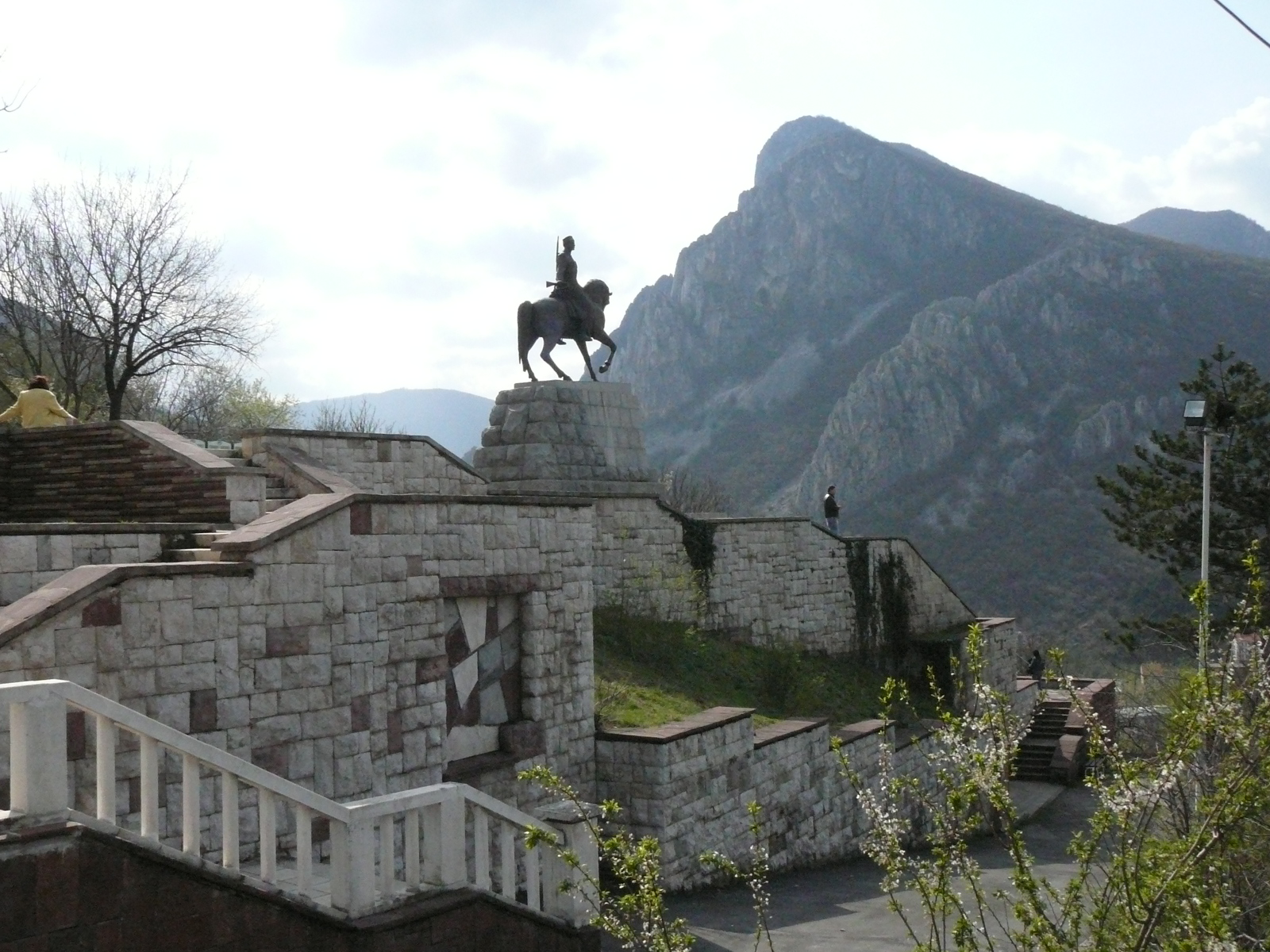 Vratsa,Bulgaria